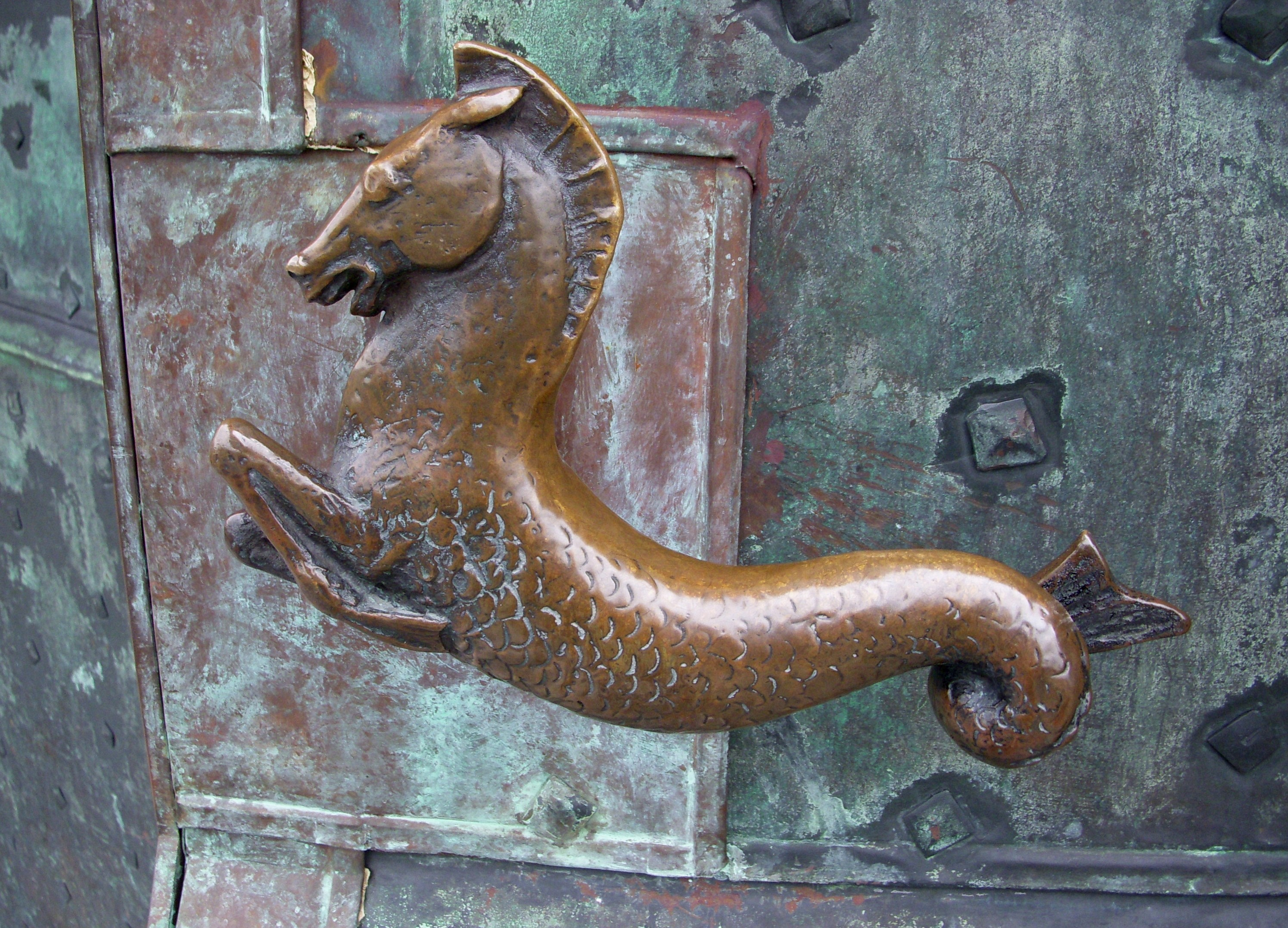 Sjöhistoriska museet i Stockholm, dörrhandtag